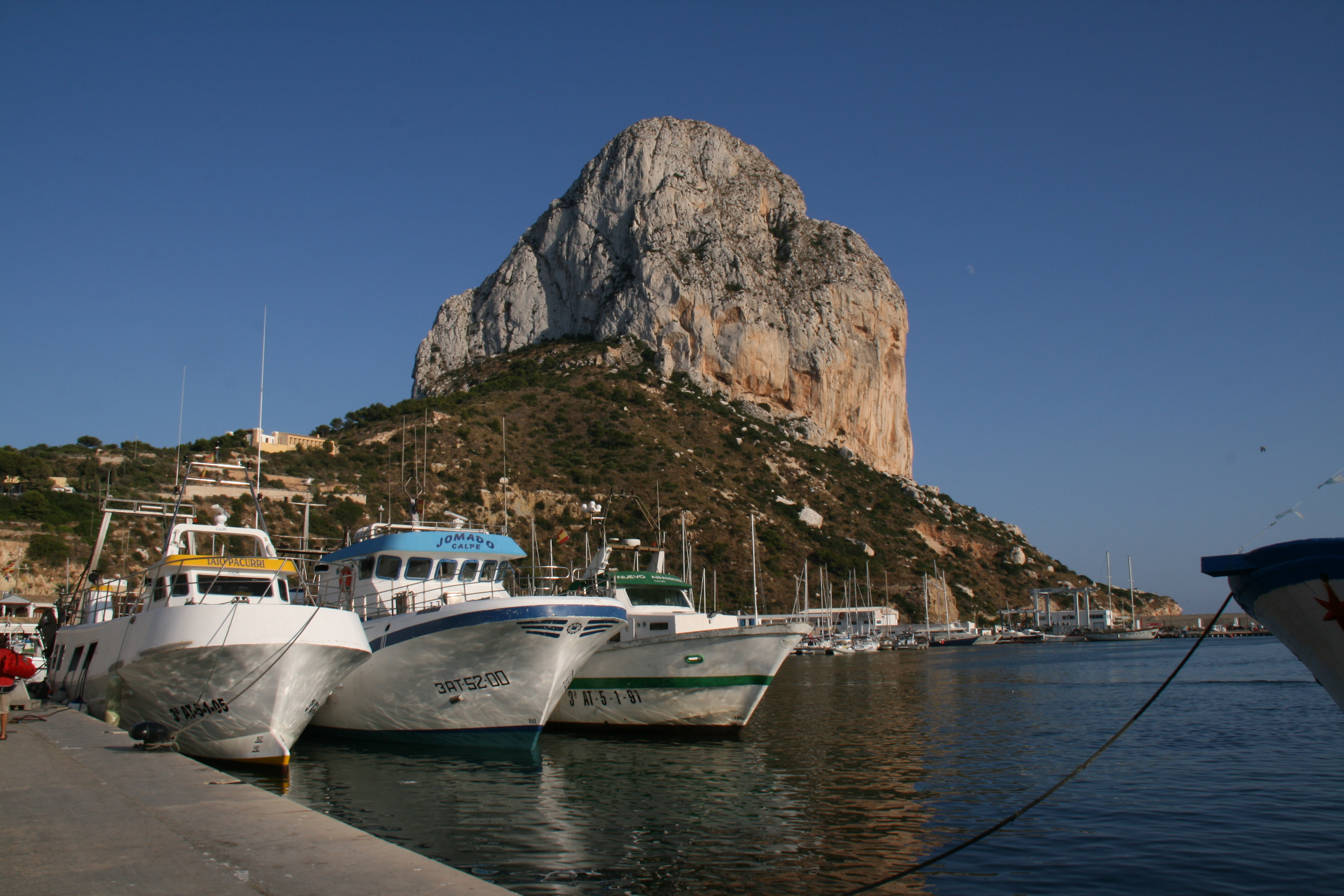 Peñon de Ifach desde el puerto